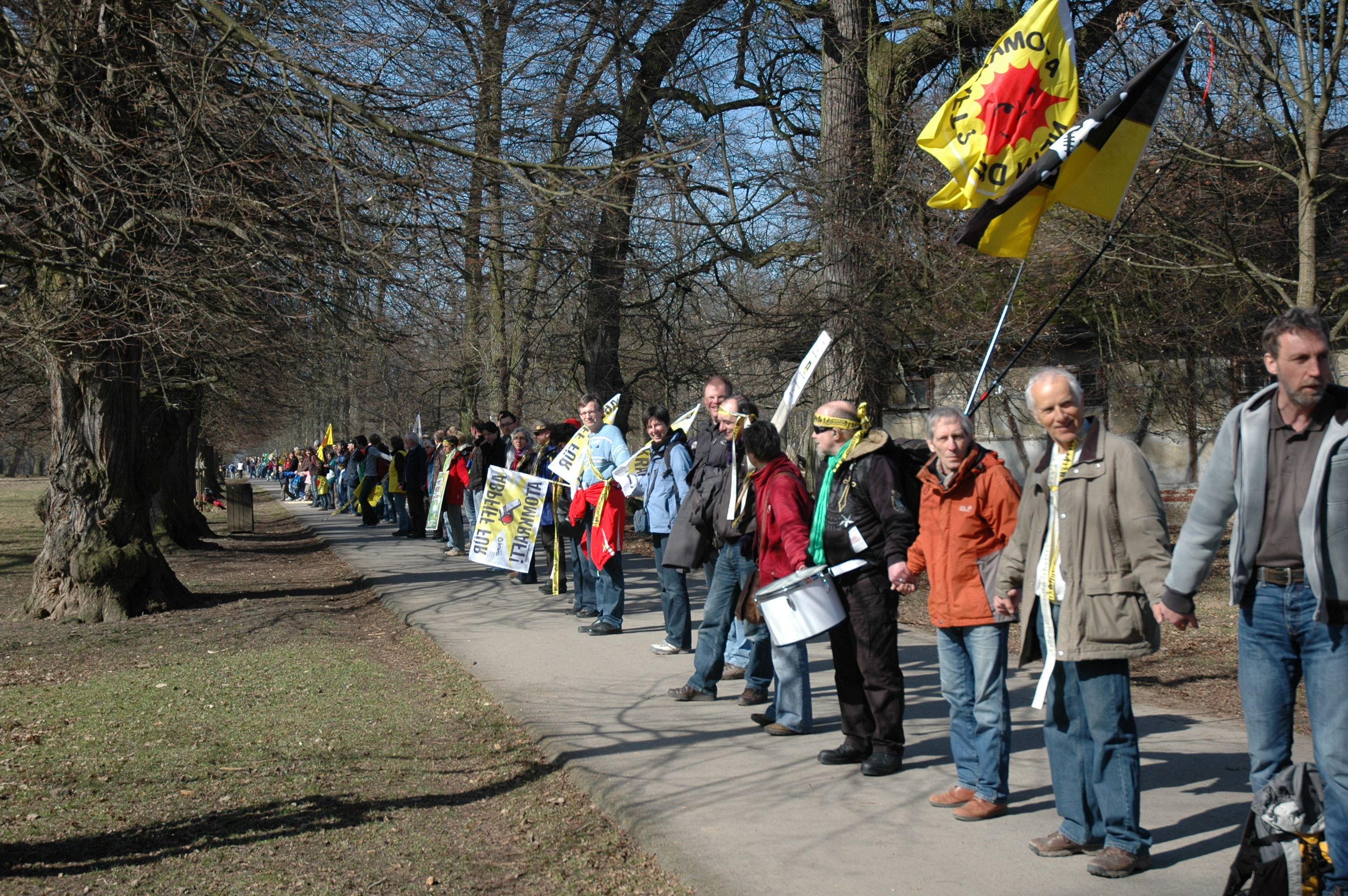 Anti-Atom-Menschenkette am 12.3. 2011 zwischen Neckarwestheim und Stuttgart in Ludwigsburg, Favoritepark